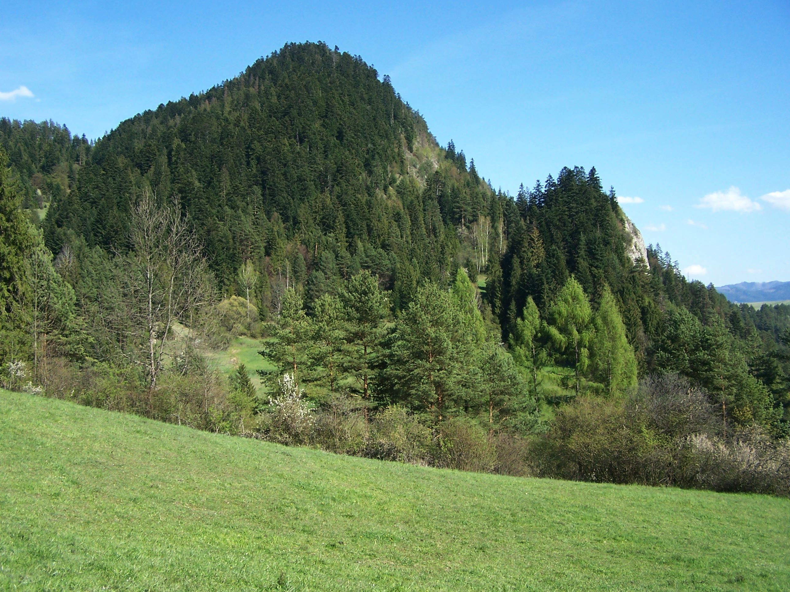 Macelowa Góra (Pieniny Właściwe)